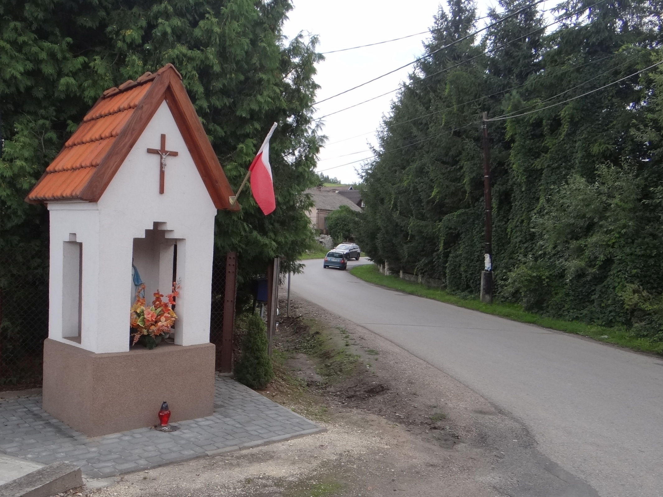 Garliczka